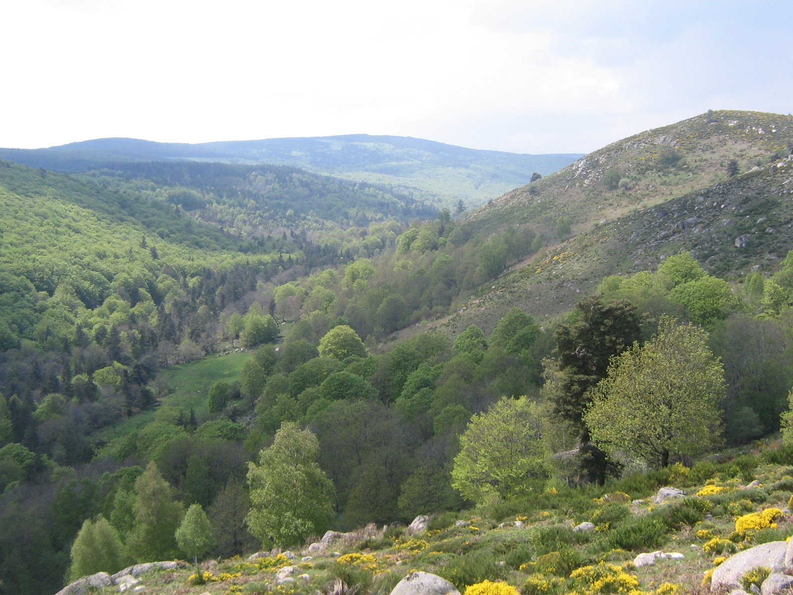 Vue du massif du Mountasset et de la vallée de Biourière (Lozère).